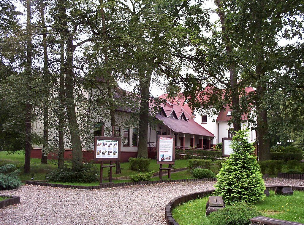 Kliniska Wielkie - Ośrodek Edukacji Przyrodniczej